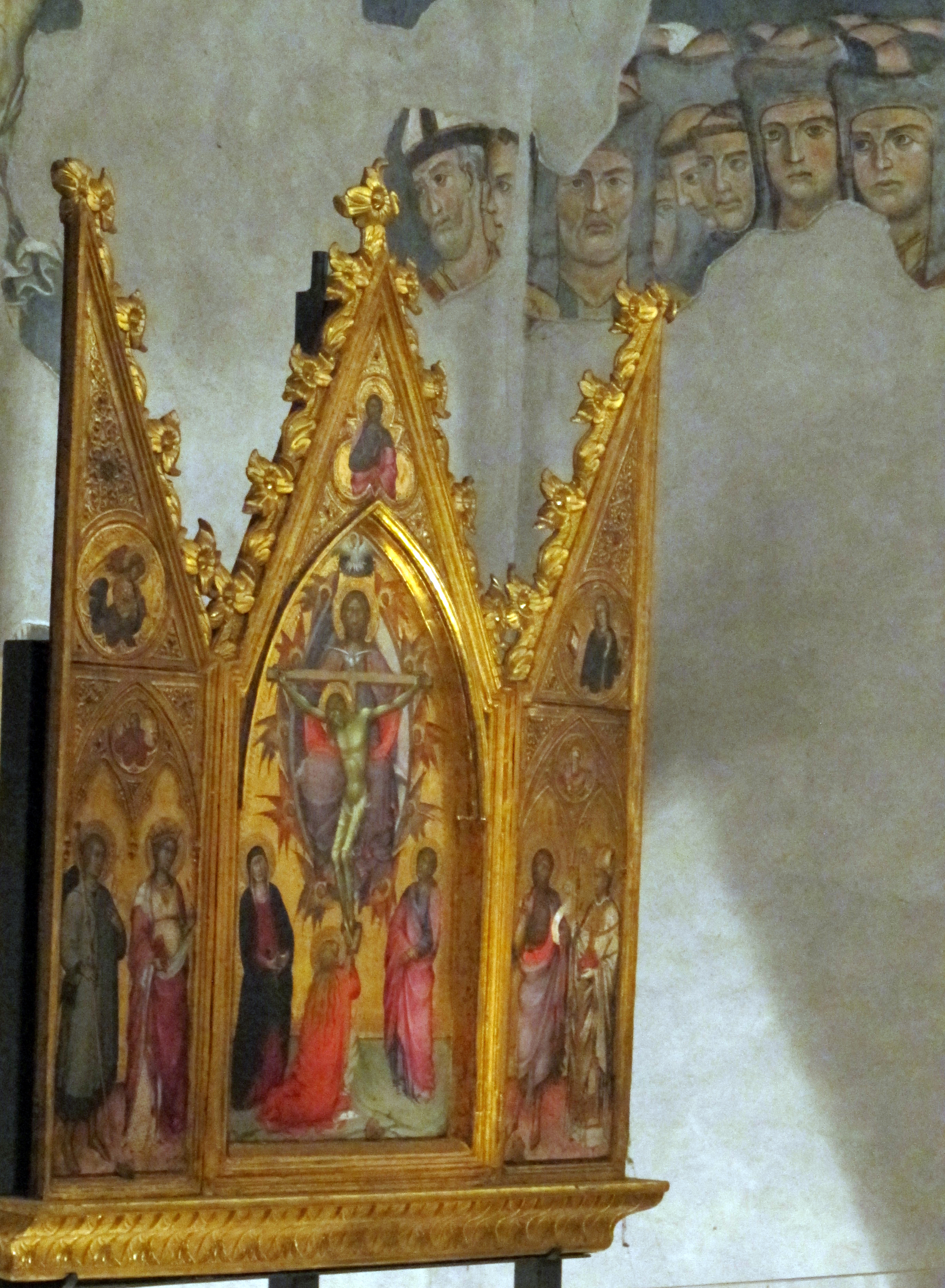 Duomo di Napoli